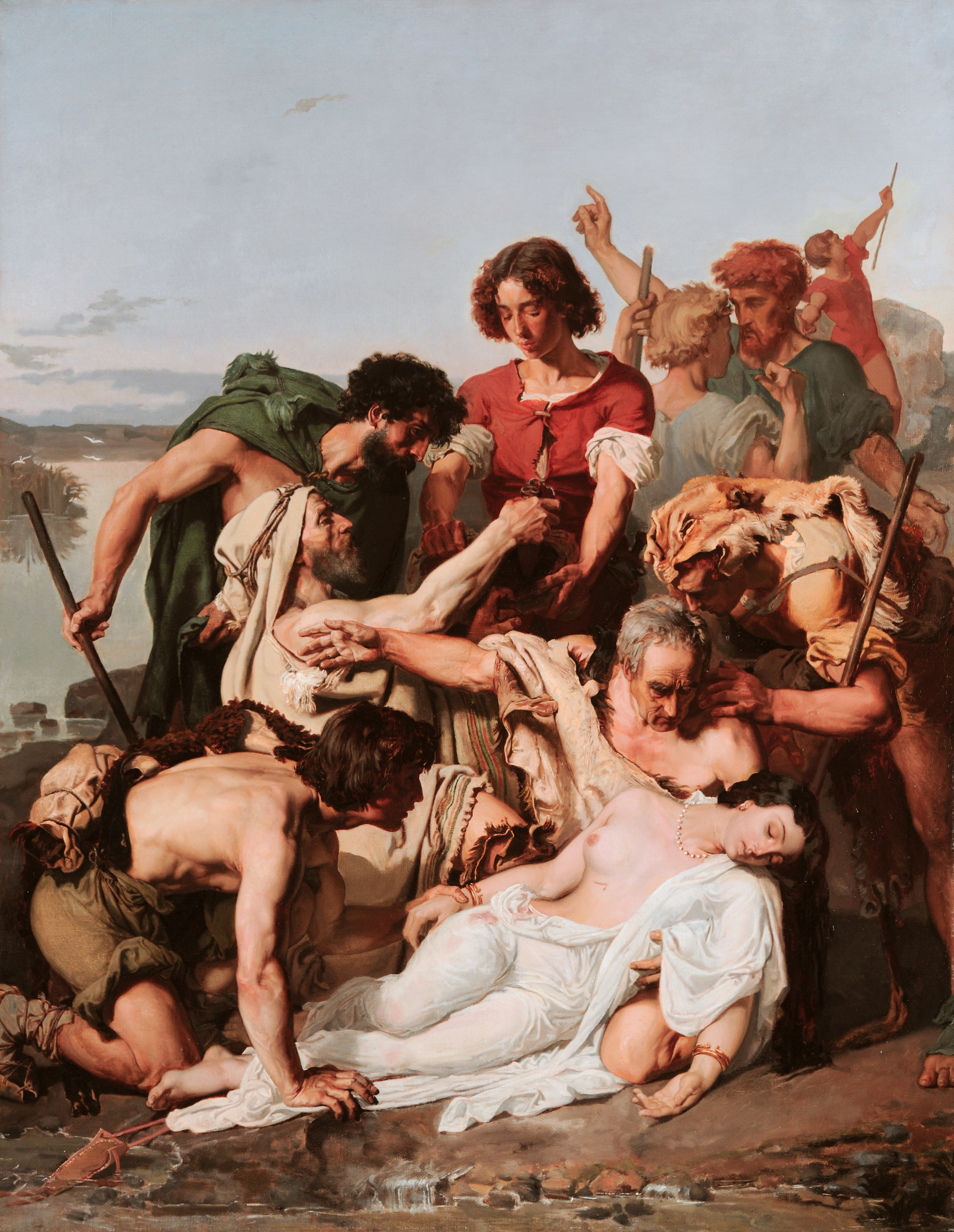 Zenobie retrouvee par les bergers sur les bords